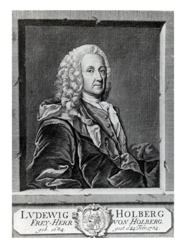 Ludvig Holberg. Engraving after Roselius' painting.